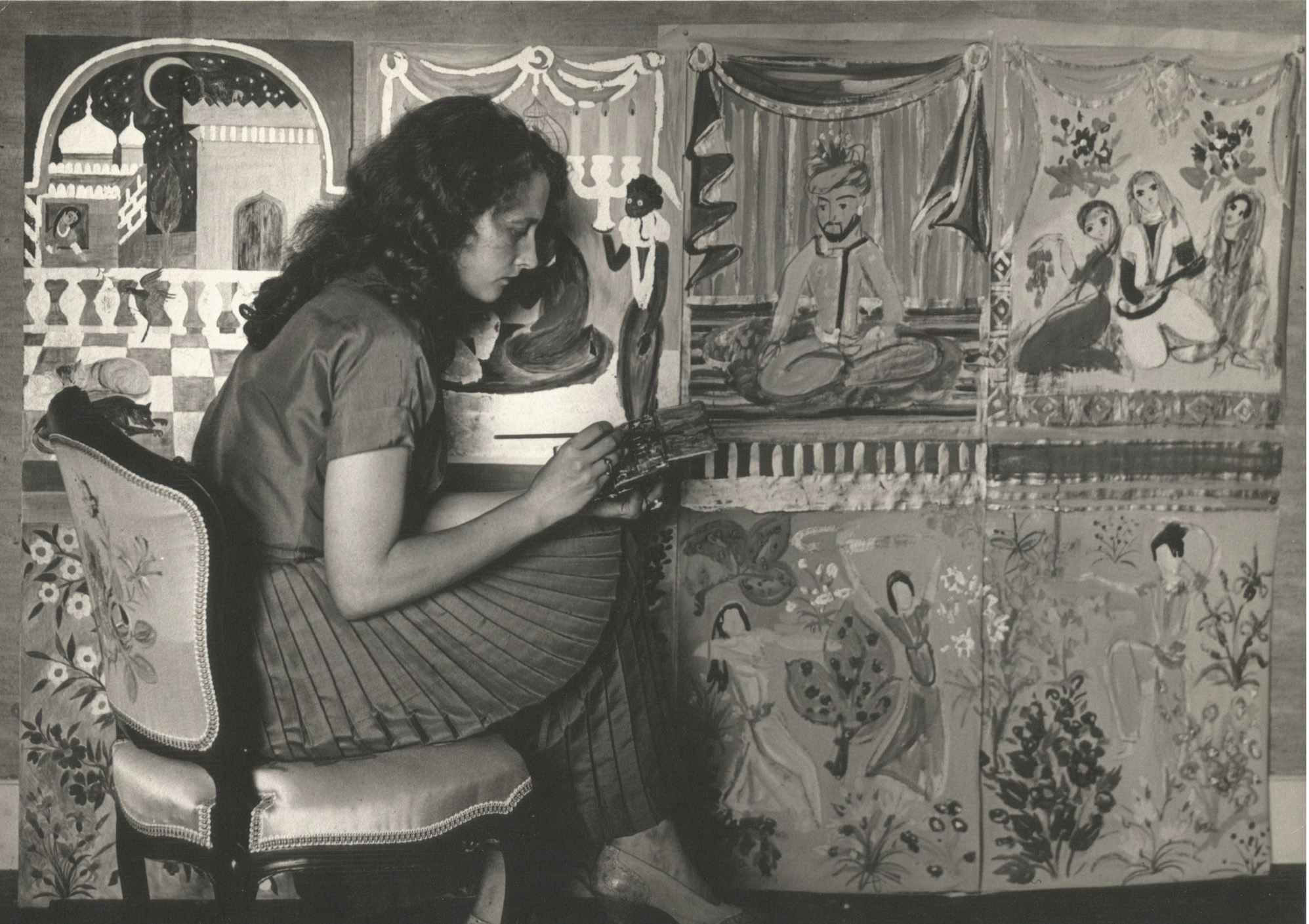 Realizzazione di un paravento. Tempera su supporto ligneo.